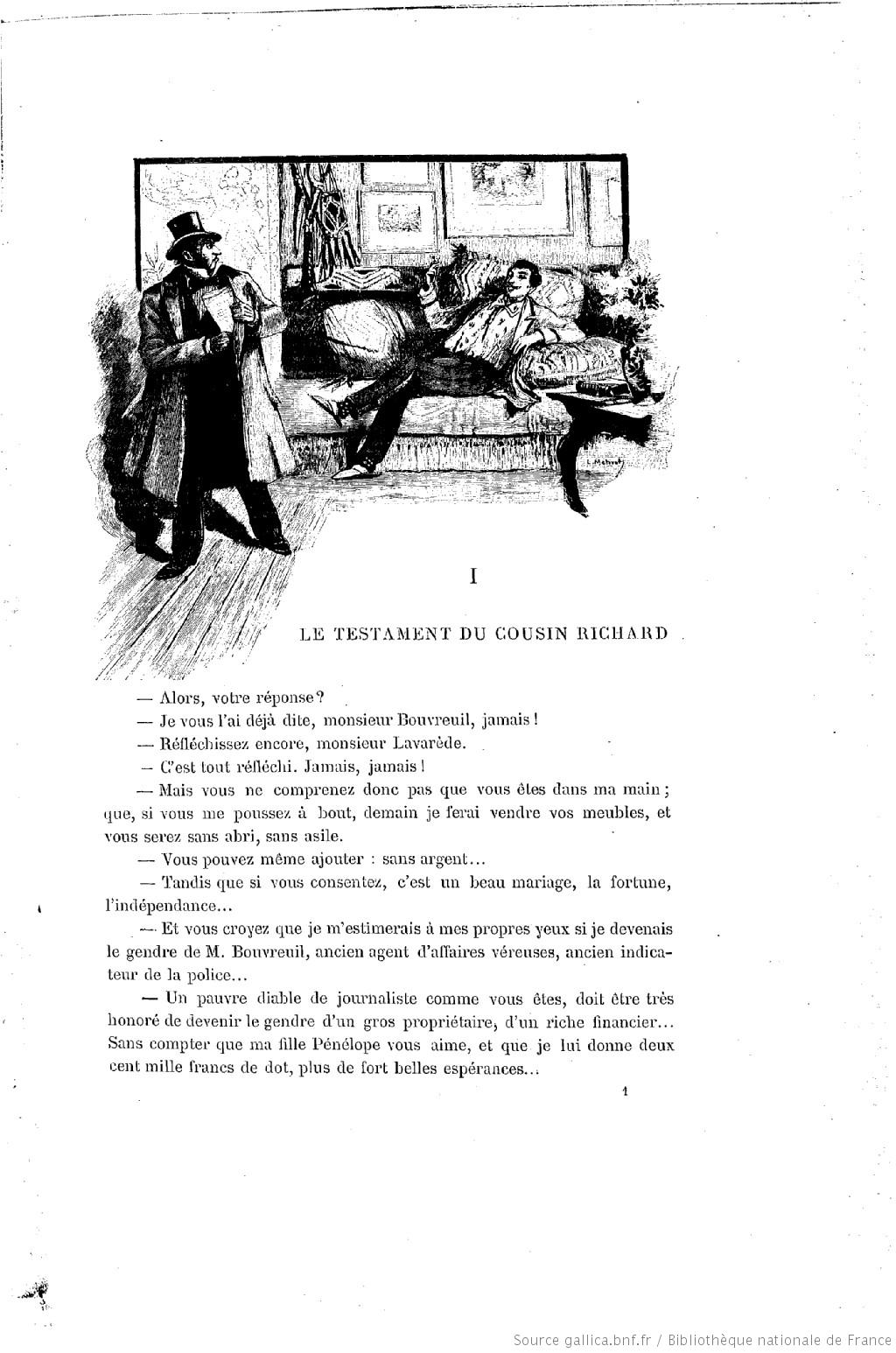 Première page du premier chapitre du roman de Paul d'Ivoi "Les Cinq Sous de Lavarède" dans l'édition originale parue en 1894. La page est illustrée d'une gravure d'un dessin de Lucien Métivet.